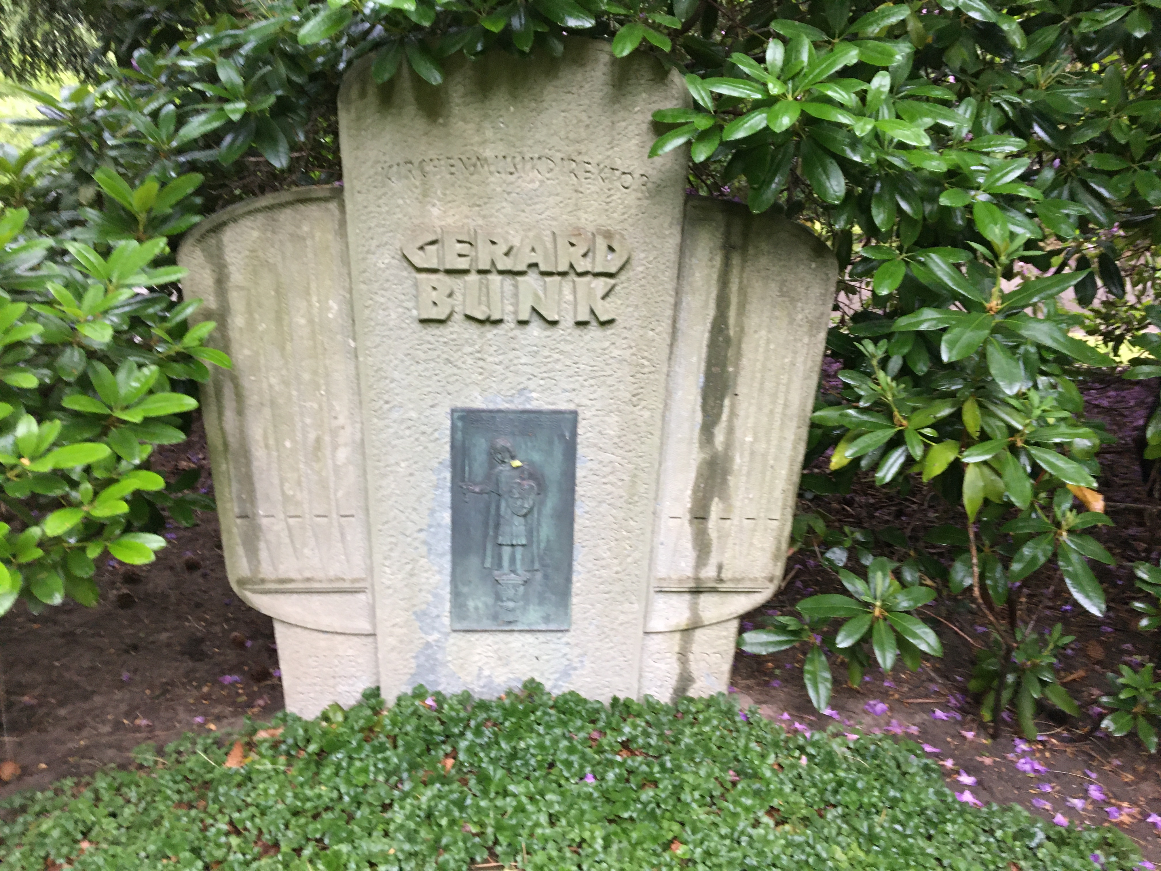 Grab des Komponisten und Organisten Gerard Bunk (1888-1958) auf dem Dortmunder Hauptfriedhof, Feld 147. Grabstein in Form eines Orgelprospekts, eingelassene Bronzeplakette mit St. Reinoldus